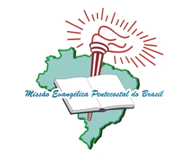 Logomarca da Missao Evangelica Pentecostal do Brasil.